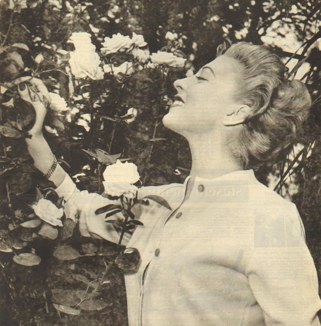 Italian actress Isa Barzizza